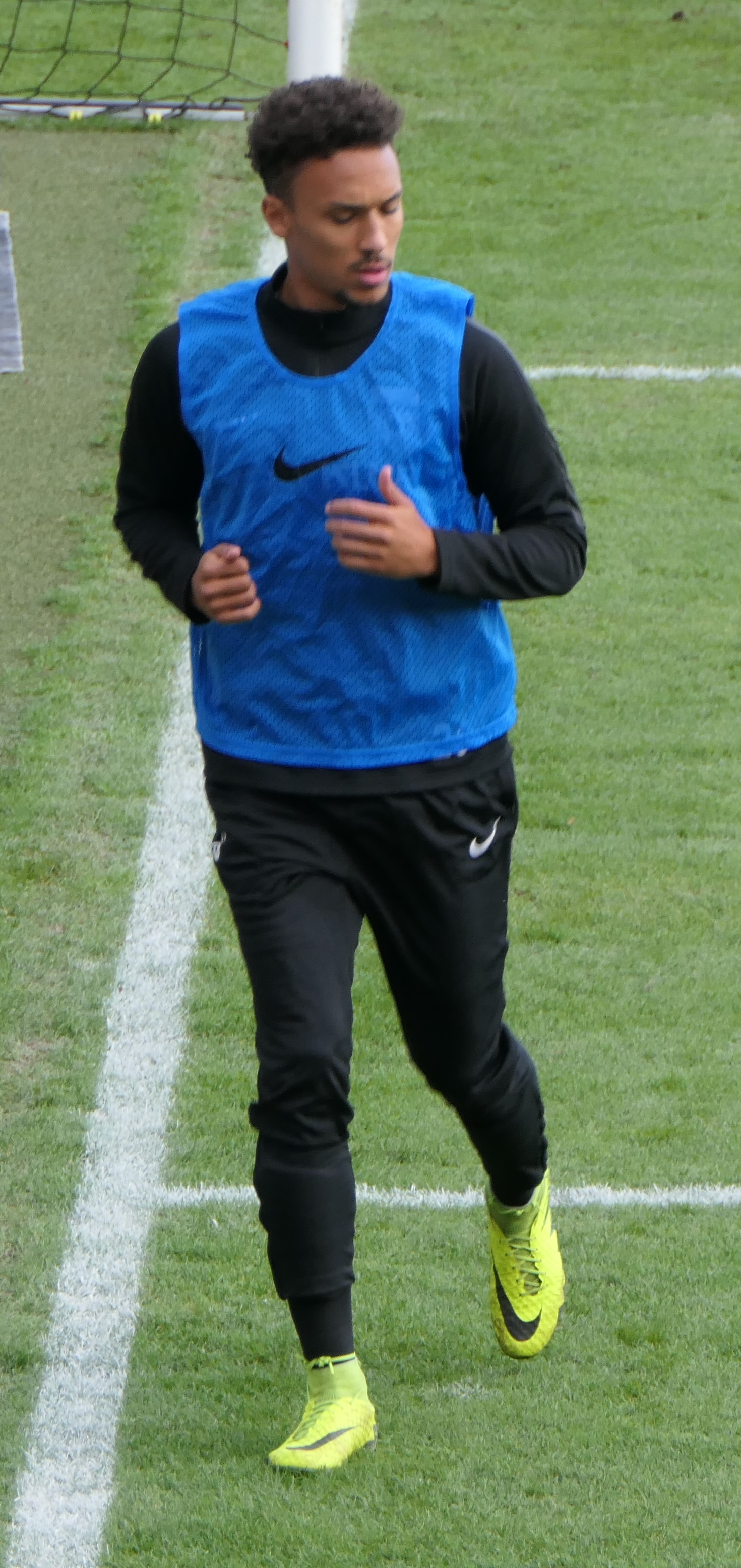 Der Fussballprofi Jamil Dem von der SG Sonnenhof Großaspach beim Heimspiel gegen Eintracht Braunschweig am 03.11.2018.